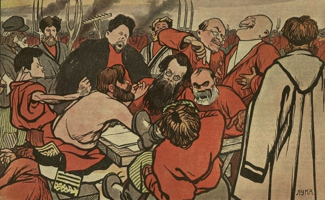 «Думцы» — вольное подражание картине И. Е. Репина «Запорожцы». Головин пишет ответ Столыпину. Направо — Ф. А. Головин с И. В. Гессеном. За столом, сбросив министерский мундир, сидит г. Кутлер; перед ним депутаты Кизеветтер и Нечитайло; за его спиною — г. Алексинский. В бурке — товарищ председателя г. Познанский. Среди других депутат Пьяных и проч.